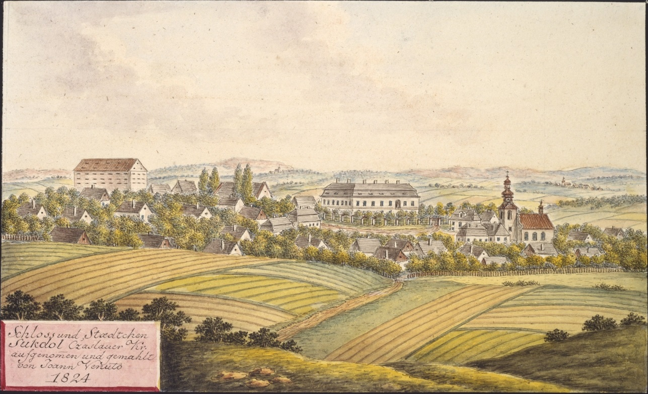 Zámek a městys Suchdol. Schloss und Staedtchen Sukdol Czaslauer Kr., aufgenommen und gemahlt von Joann Venuto 1824